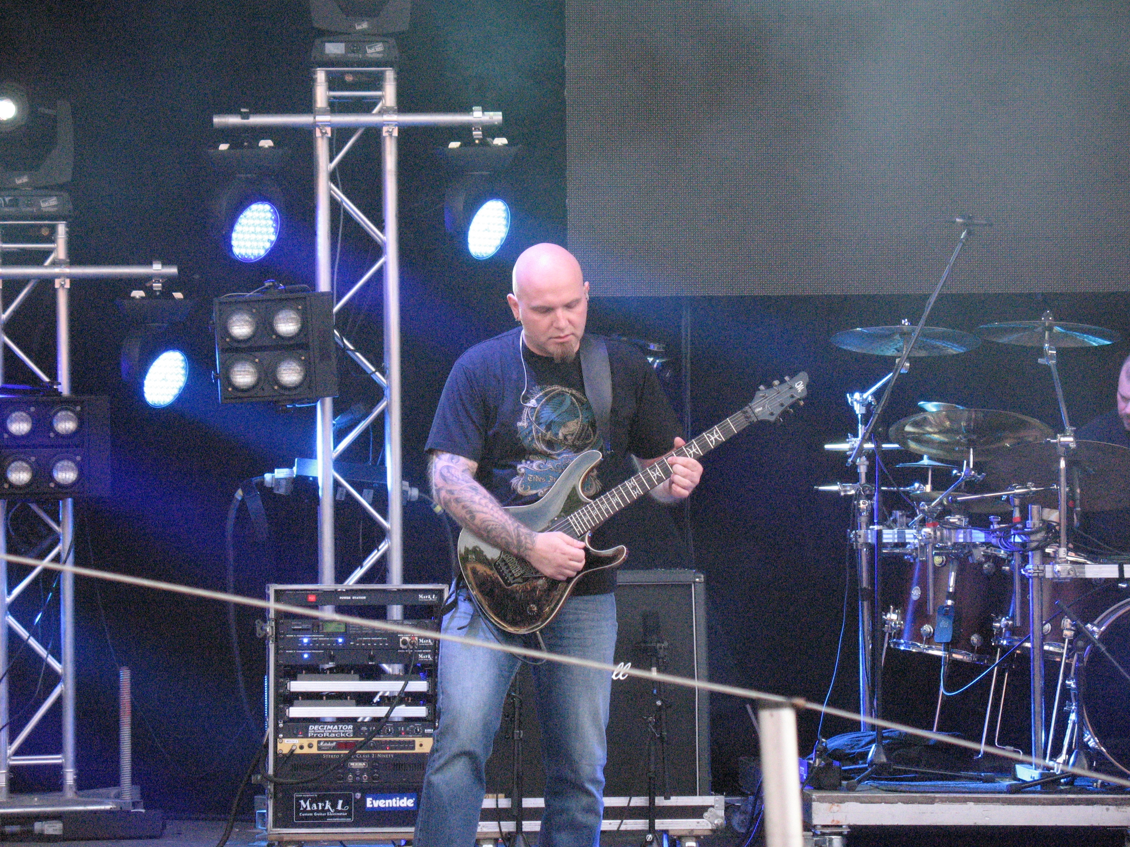 Piotr "Grudzień" Grudziński of Polish rock band Riverside